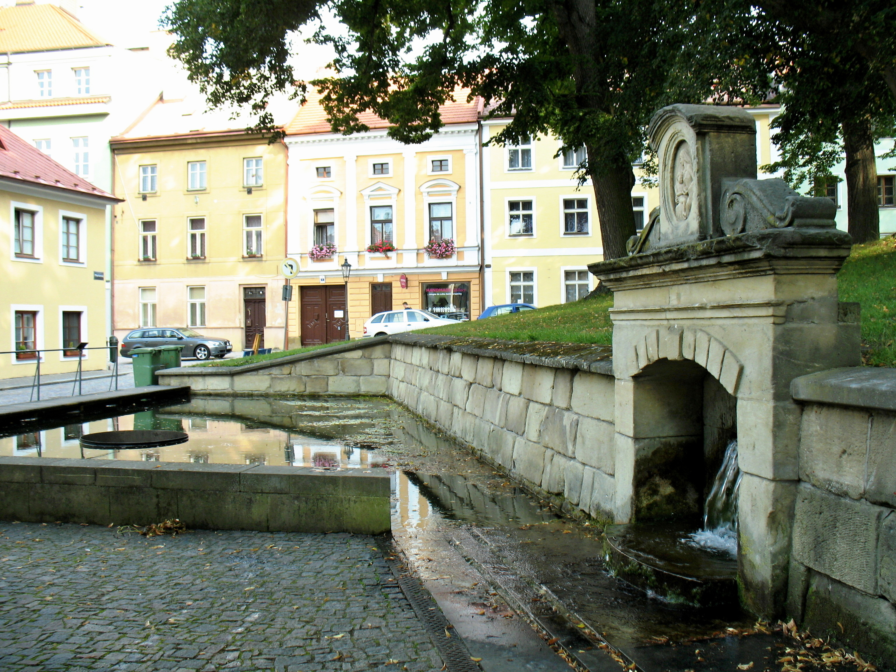 Parčík mezi Jiráskovou a Mariánskou ulicí pod zámkem v Litomyšli s kašnou, vyvěračkou Na máchadle a výtvarnou instalací autorů Václava Cíglera a Michala Motyčky "Dvě hladiny" z r. 2018